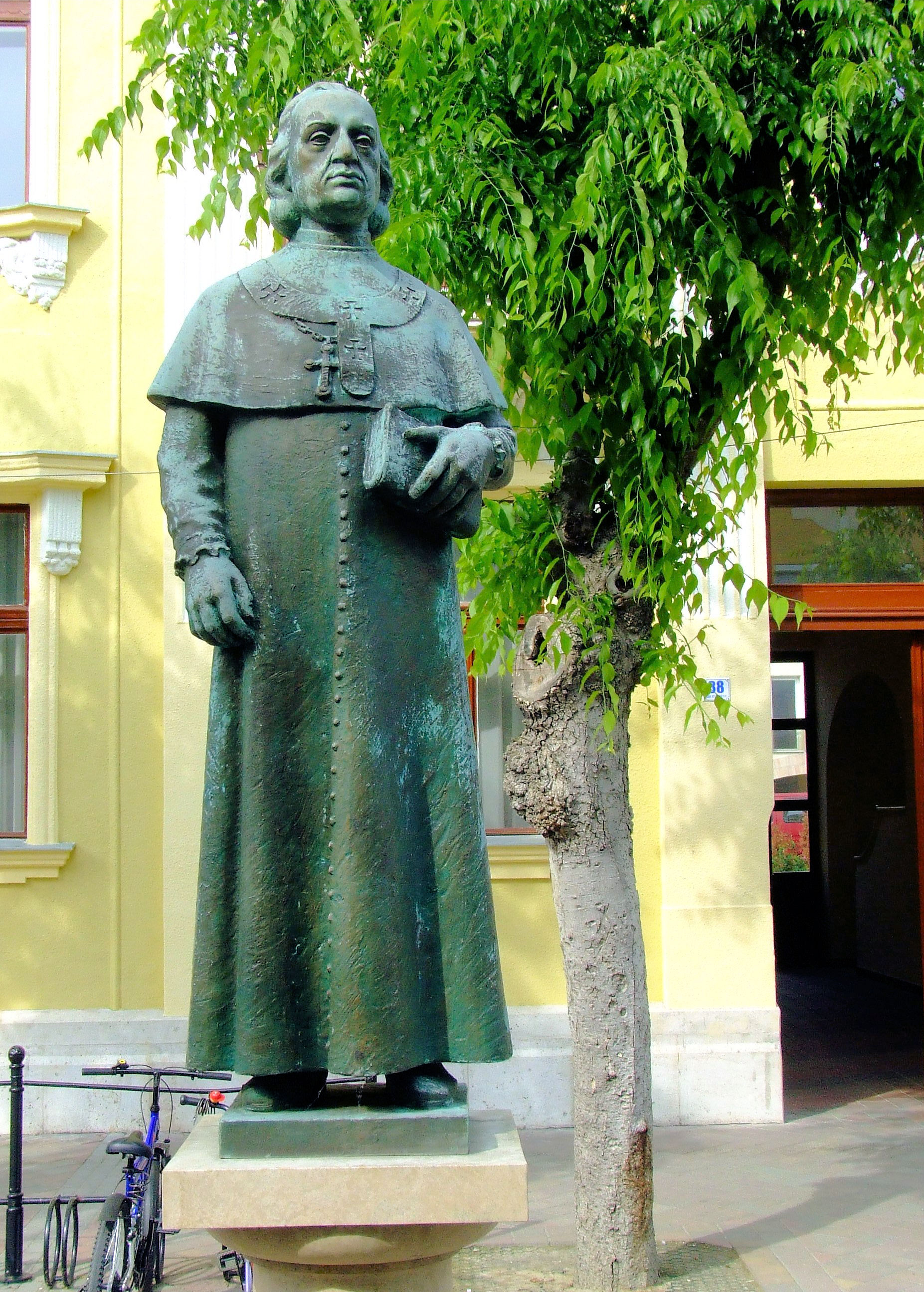 Patachich Ádám (1717–1784) kalocsai érsek, a kalocsai Főszékesegyházi Könyvtár alapítója szobra Kalocsán. Bocskai Vince alkotása (2000)